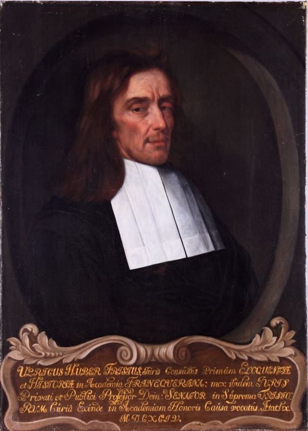 Portret in olieverf van Ulricus (Ulrik) Huber, professor in de welsprekendheid, geschiedenis, politica en rechten aan de Franeker universiteit van 1657 tot 1694. Ulricus Huber (Dokkum 12 maart 1636 - Franeker 8 november 1694) was hoogleraar welsprekendheid, geschiedenis, rechten van 1657 tot 1679. Huber was een van de beroemdste juristen van de zeventiende eeuw. (tekst Museum Martena)